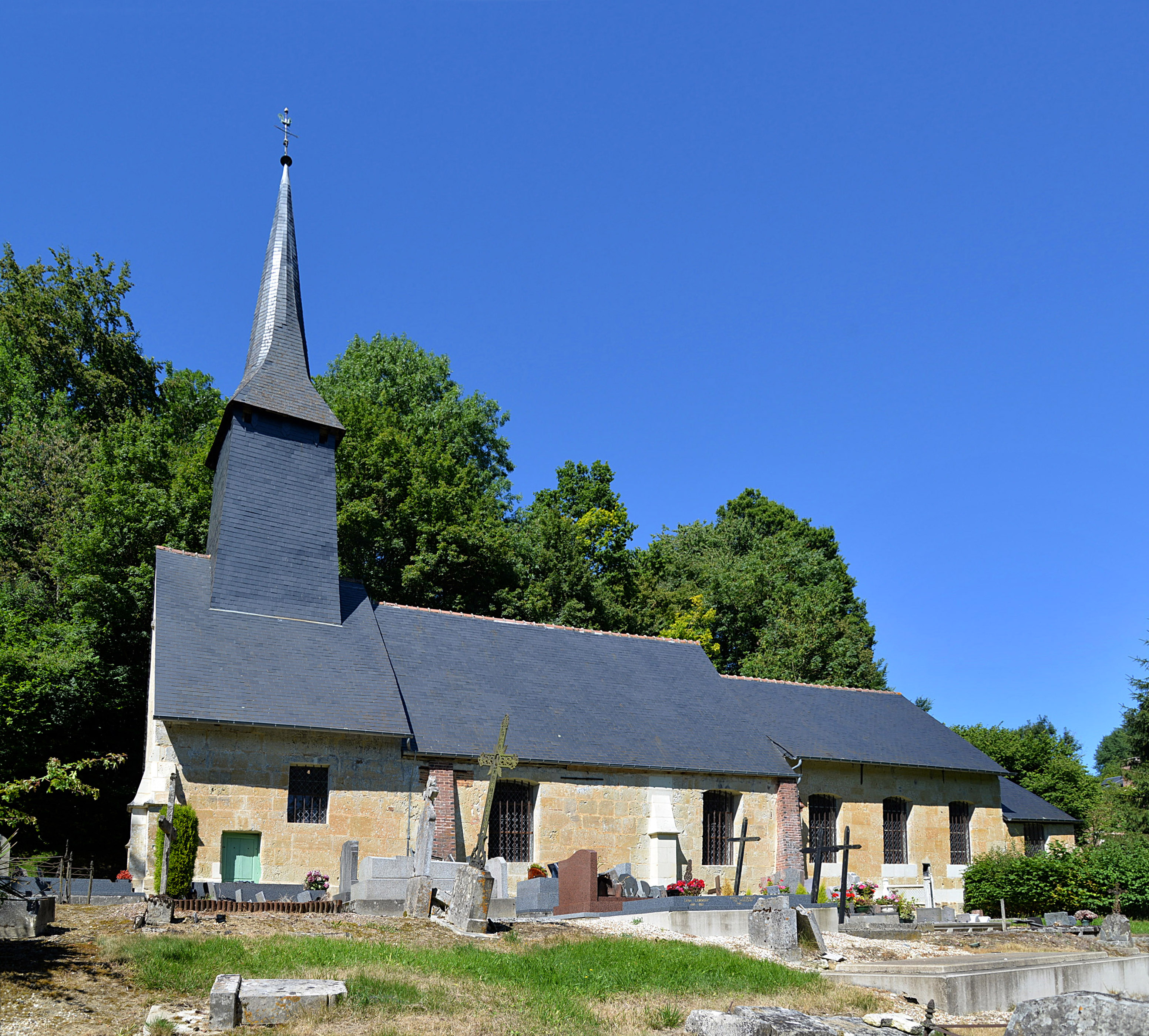 La Croupte (Calvados)